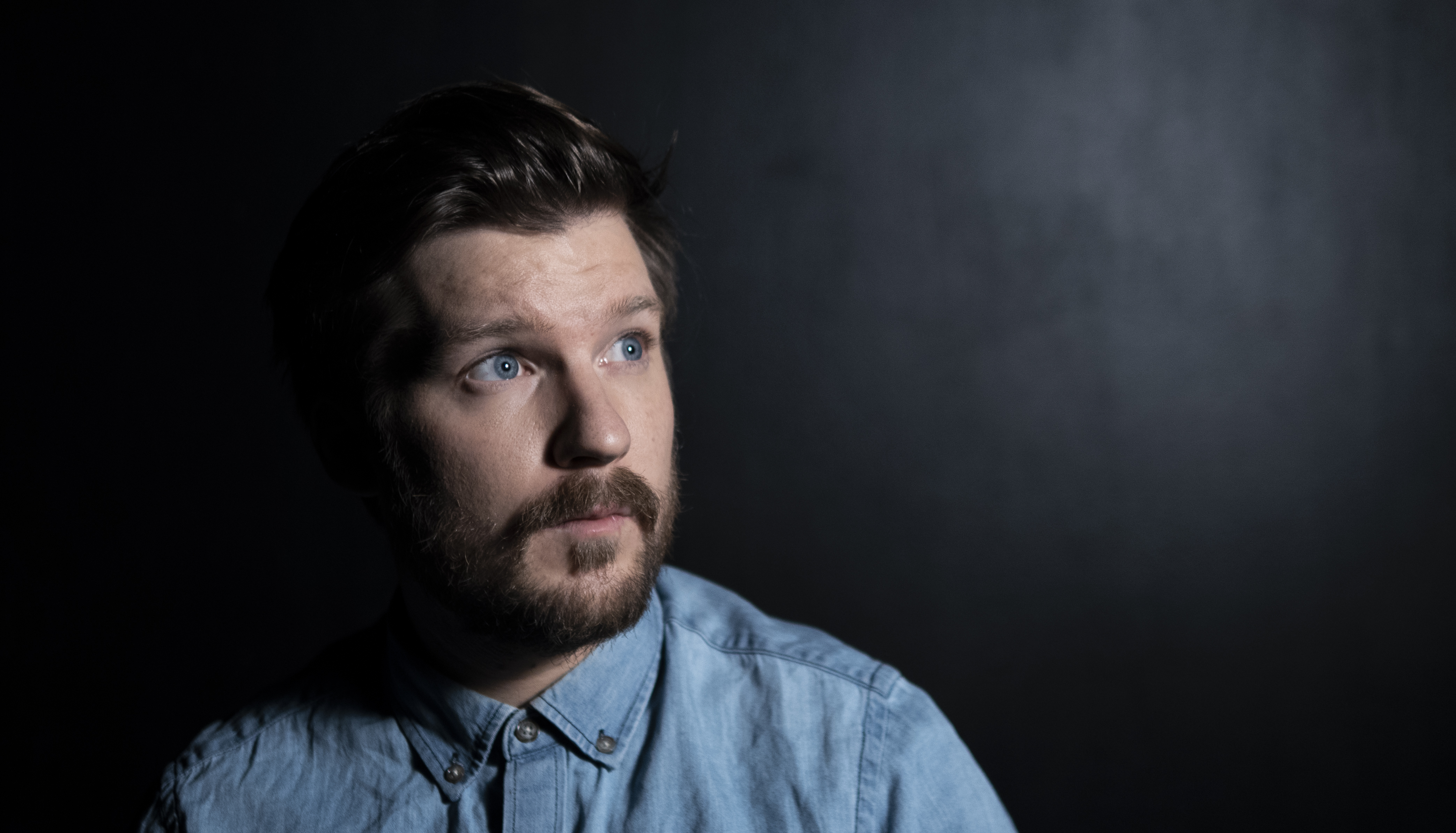 Portätt av Philip Lithner, fotograferat i december 2018 på Masthuggsteatern i Göteborg